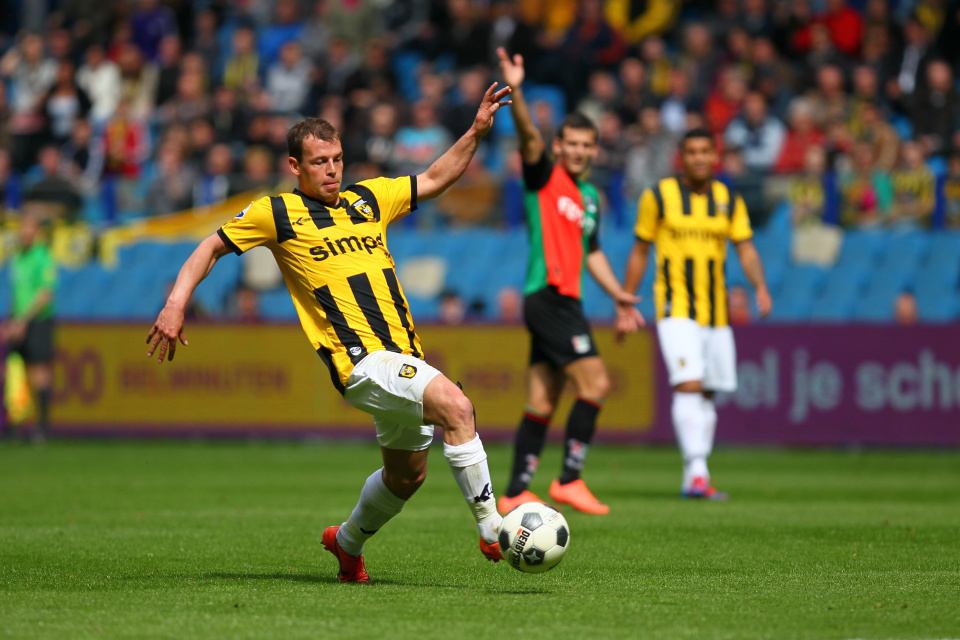 Nick Hofs controleert de bal